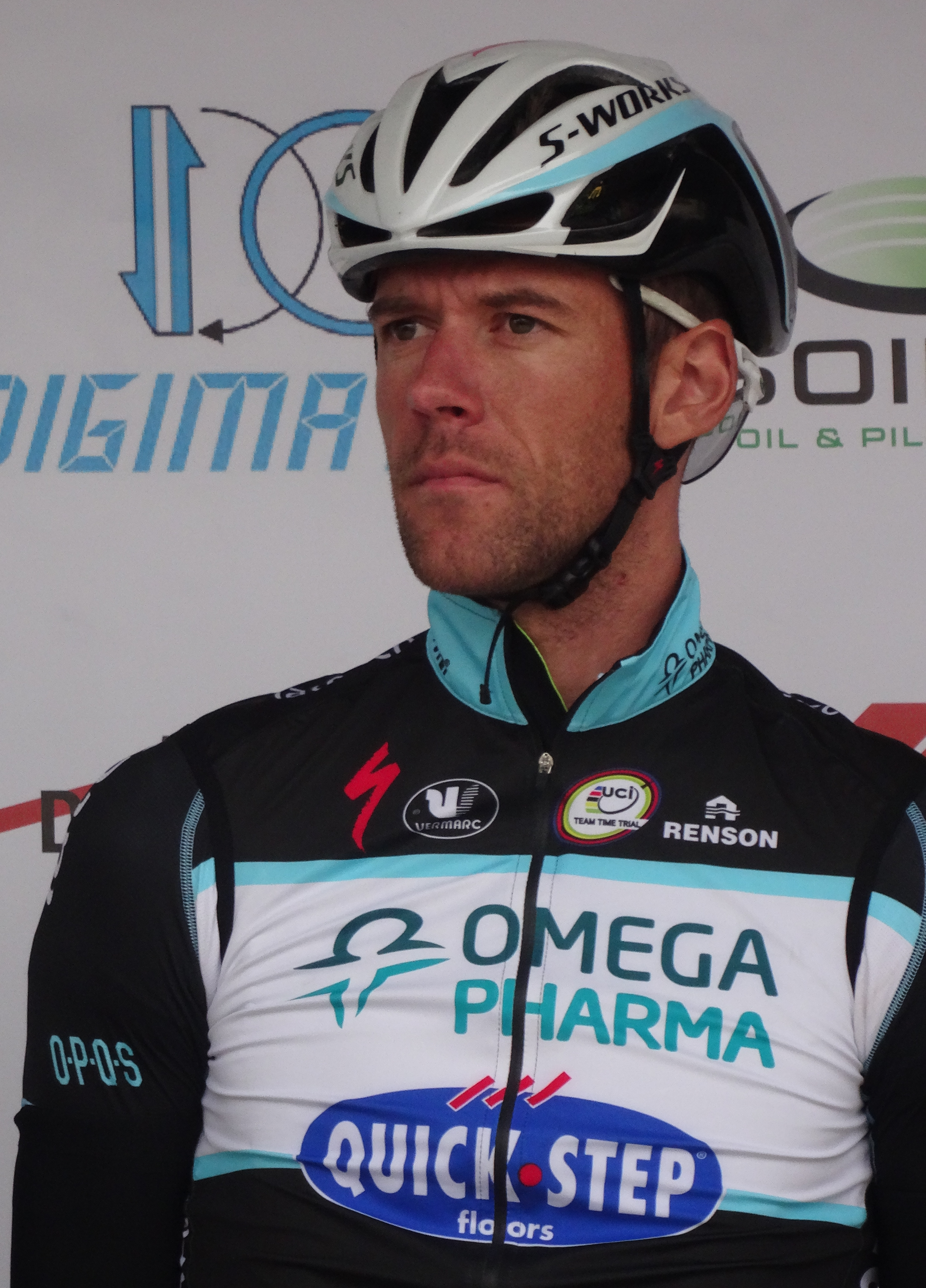 Reportage photographique réalisé le mercredi 24 septembre à l'occasion du départ et du début de la course du Circuit du Houtland 2014 à Lichtervelde, Belgique.